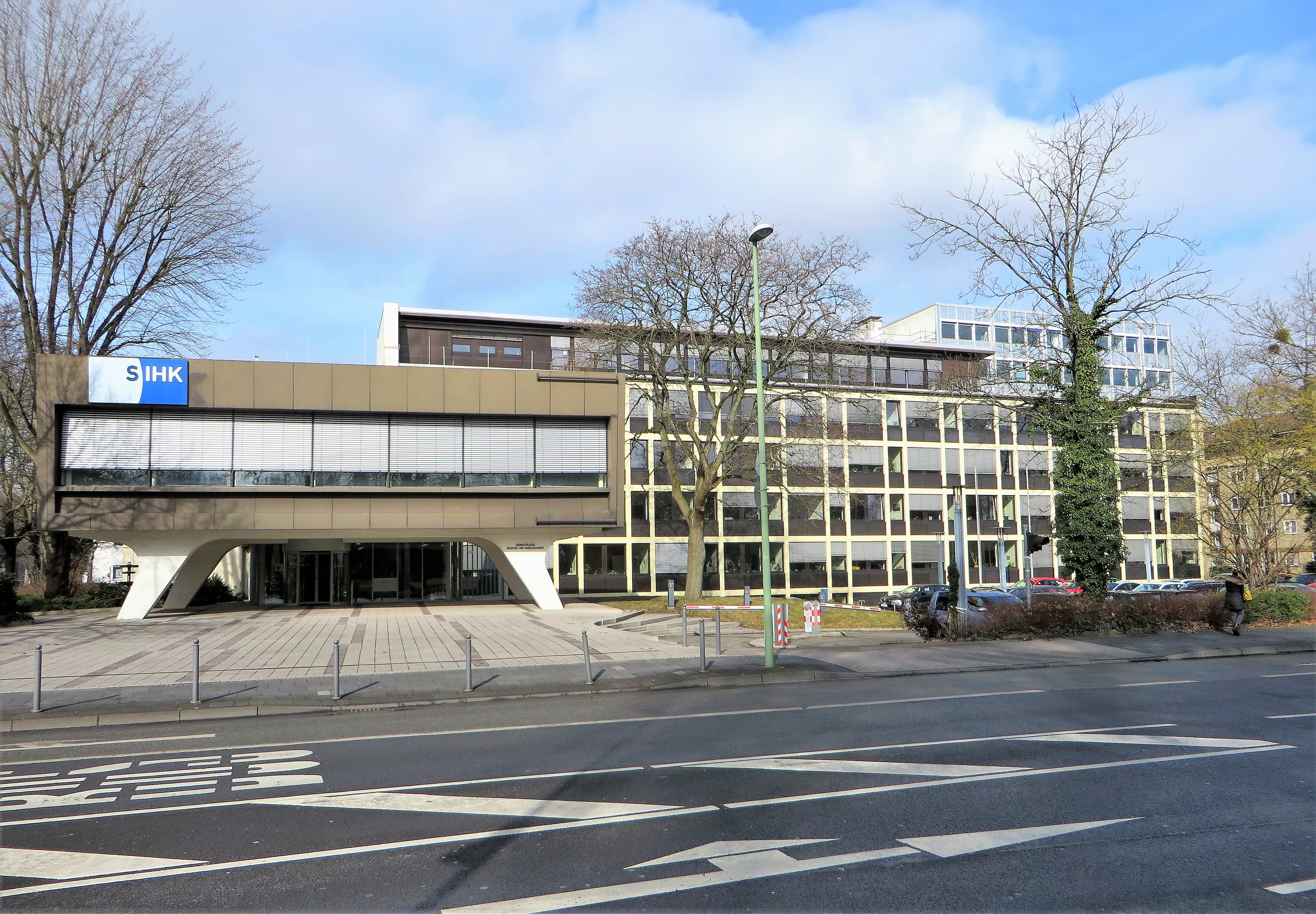 Südwestfälische Industrie- und Handelskammer zu Hagen, Bahnhofstraße 18. Erbaut 1956. Architekten: Adam Wiehl und Horst Bergmann, Hagen.